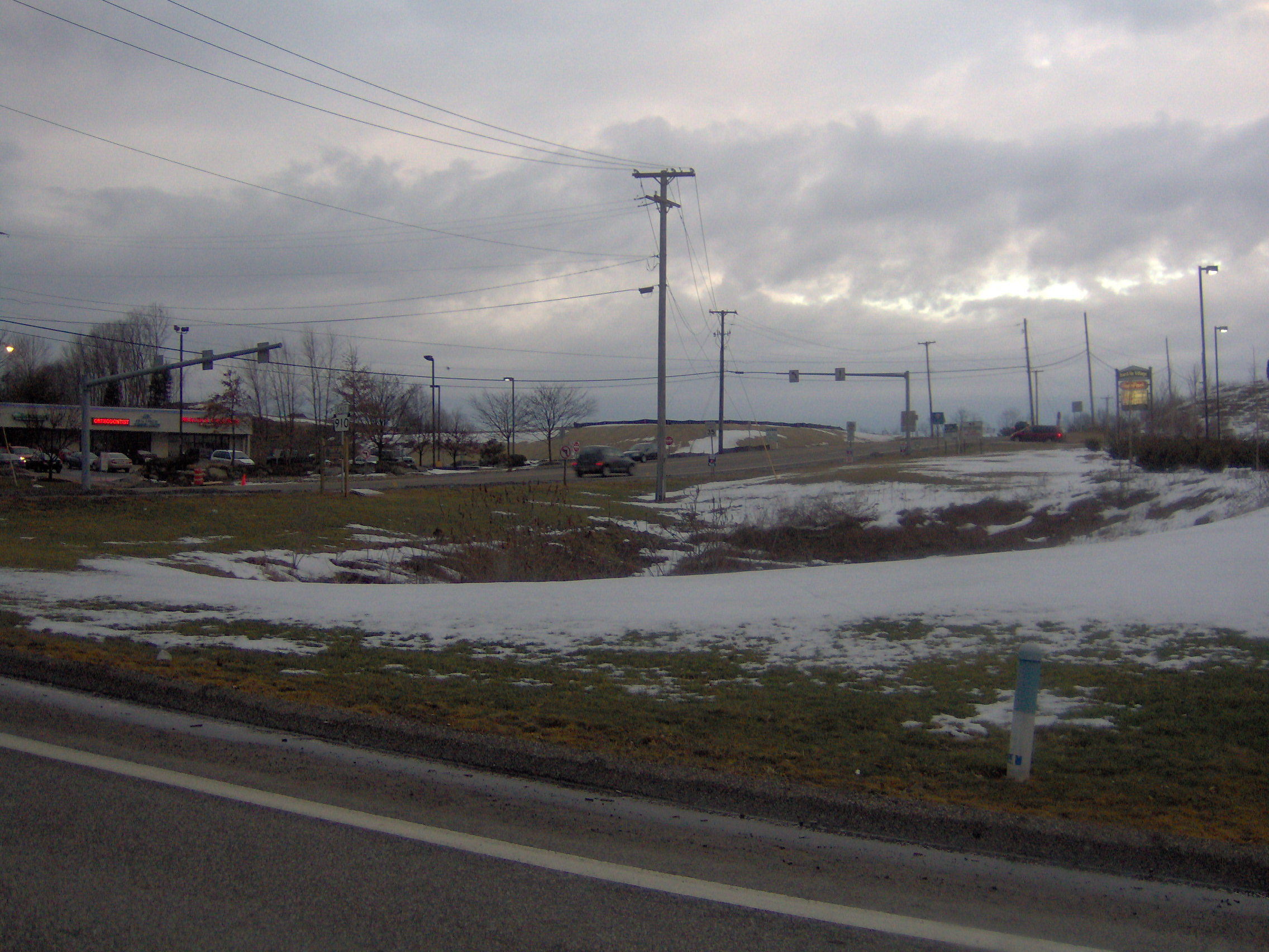 View of Pennsylvania Route 910 in Franklin Park, Pennsylvania.